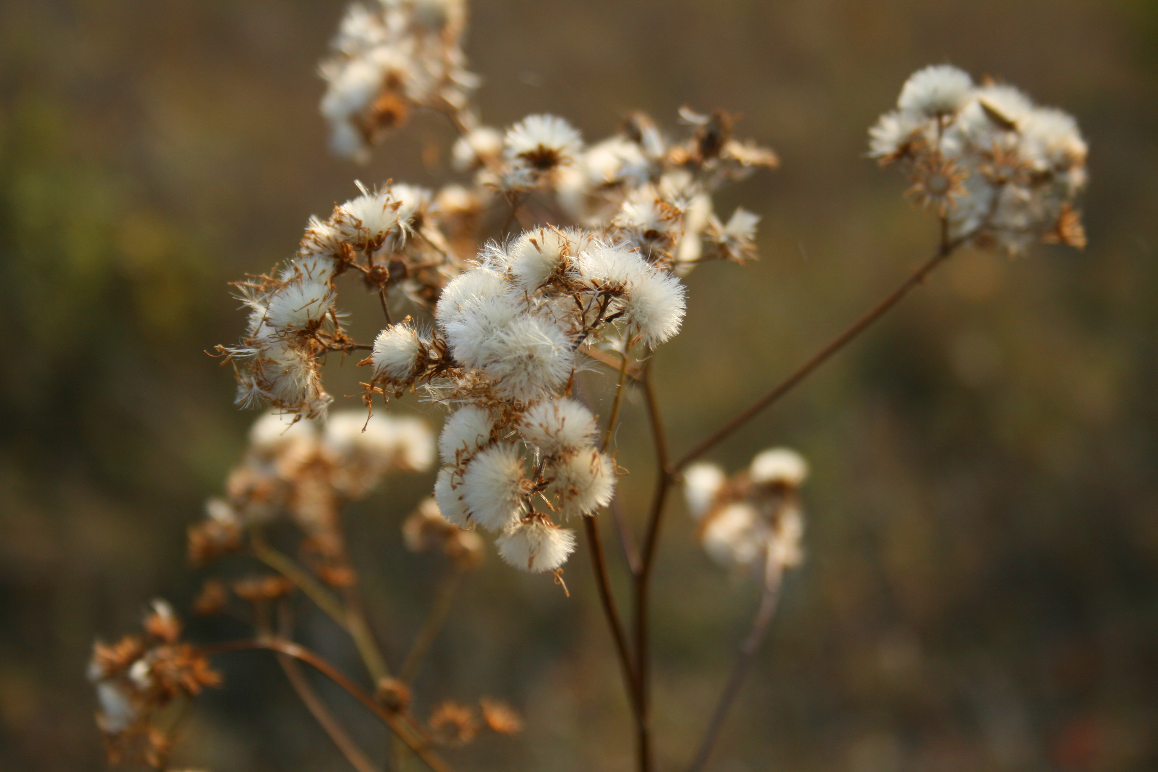 Крестовник эруколистный (Senecio erucifolius). Балка Каменный Лог, Белгородская область.